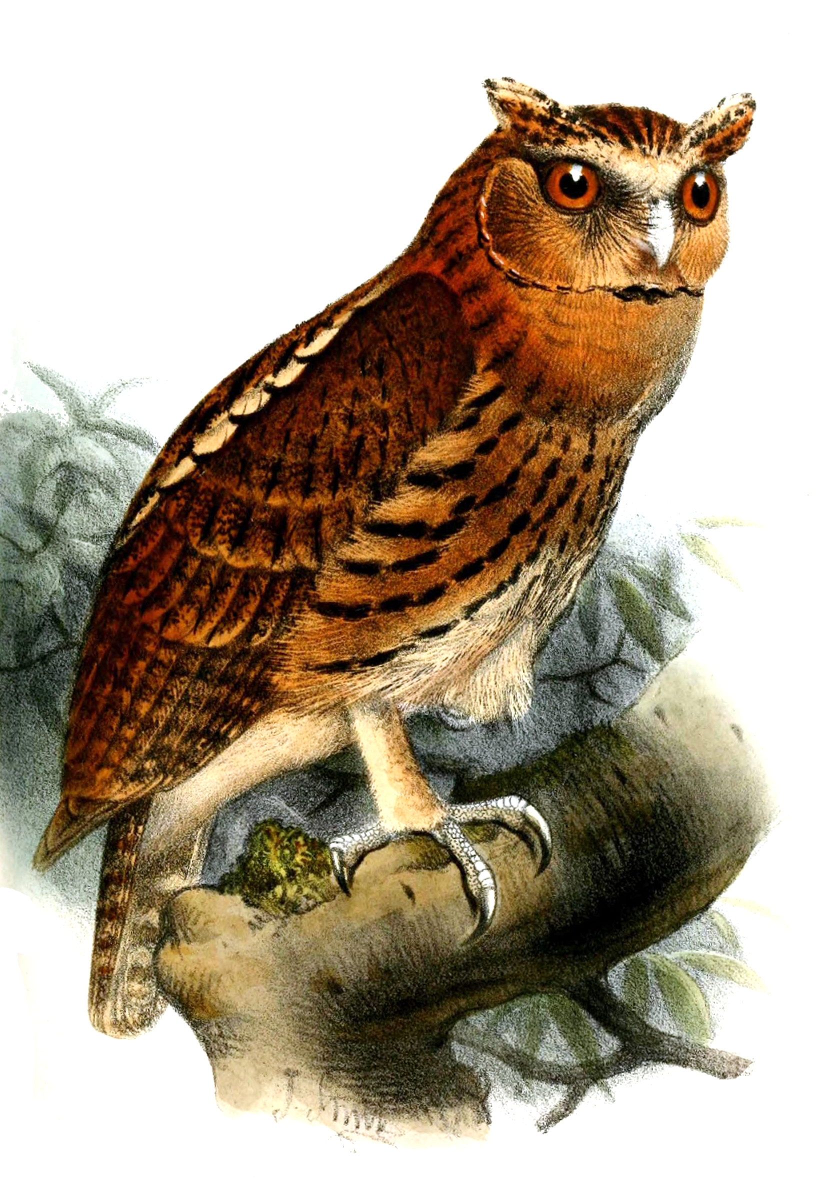 Pseudoptynx gurneyi = Mimizuku gurneyi